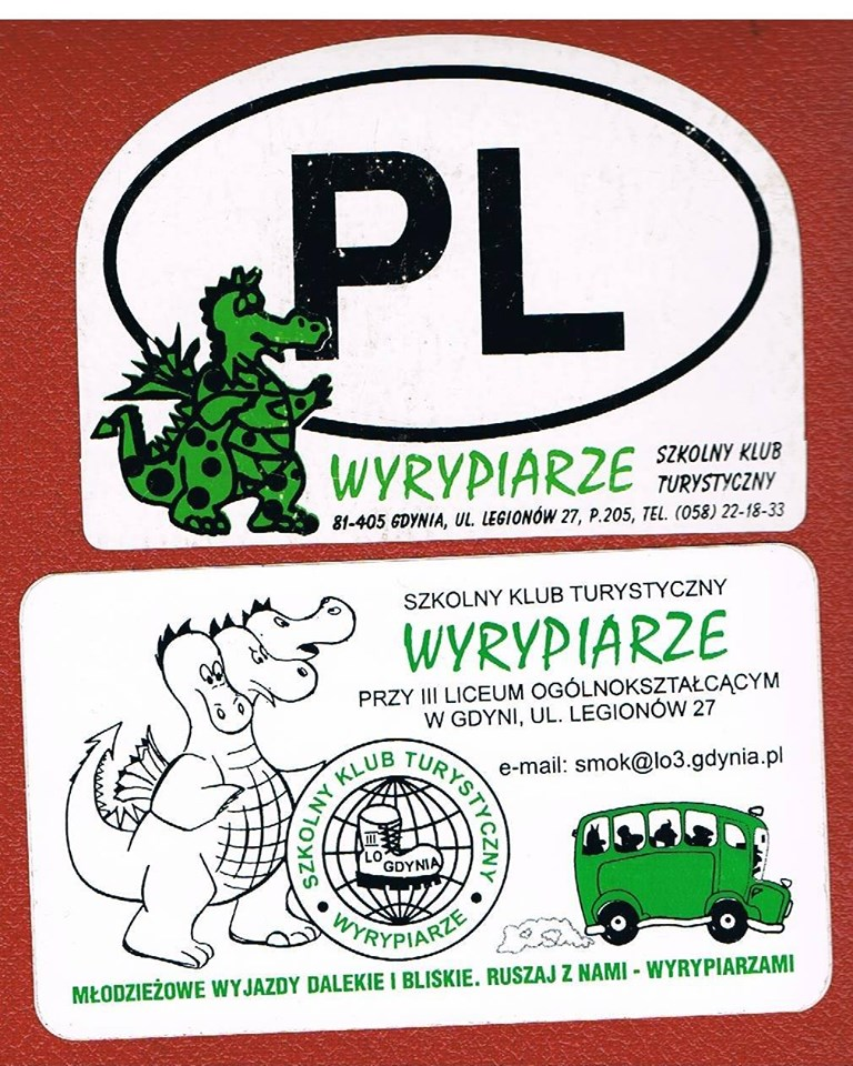 Naklejki Youth Tourist Club „Wyrypiarze”